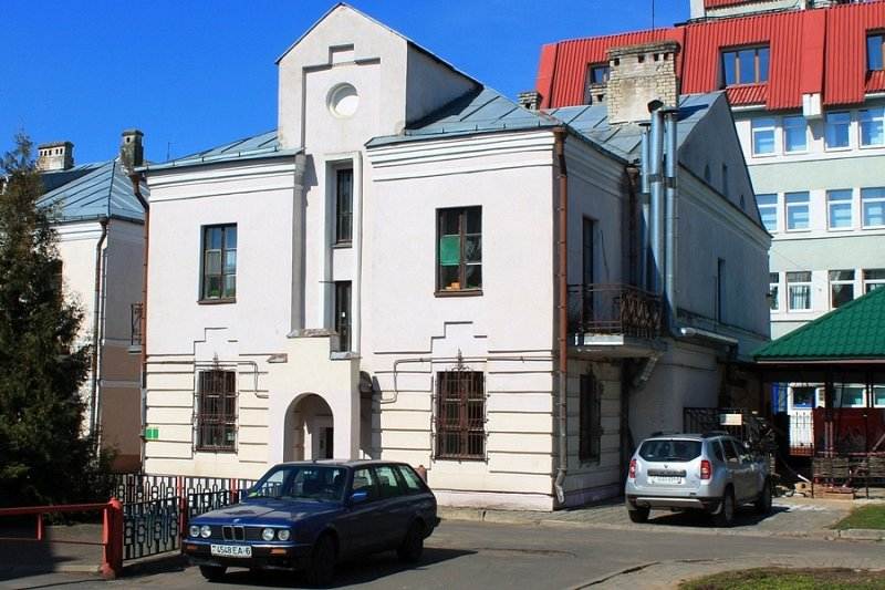 Дом купца Кітаева